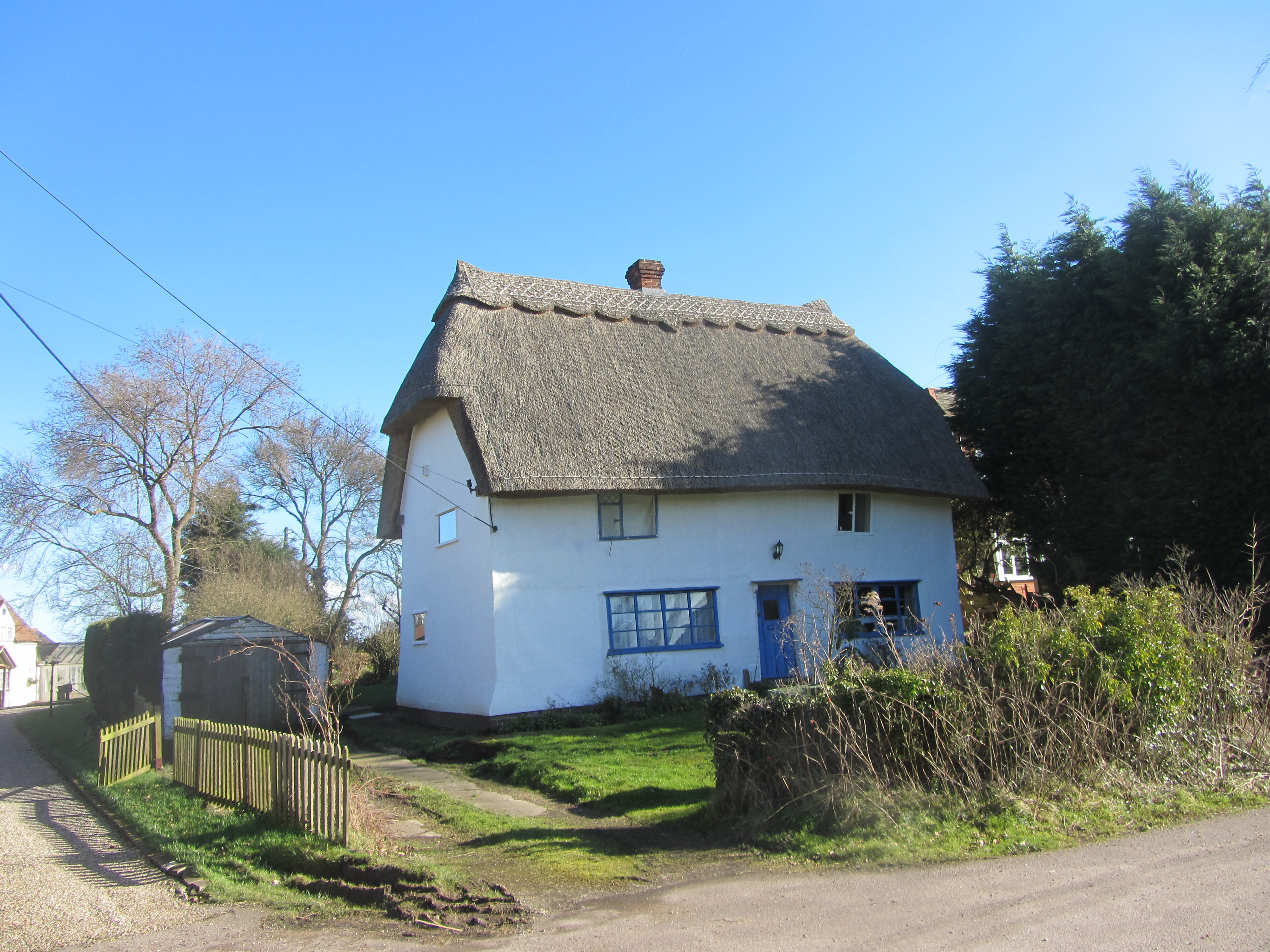 Little Owl, Ford End